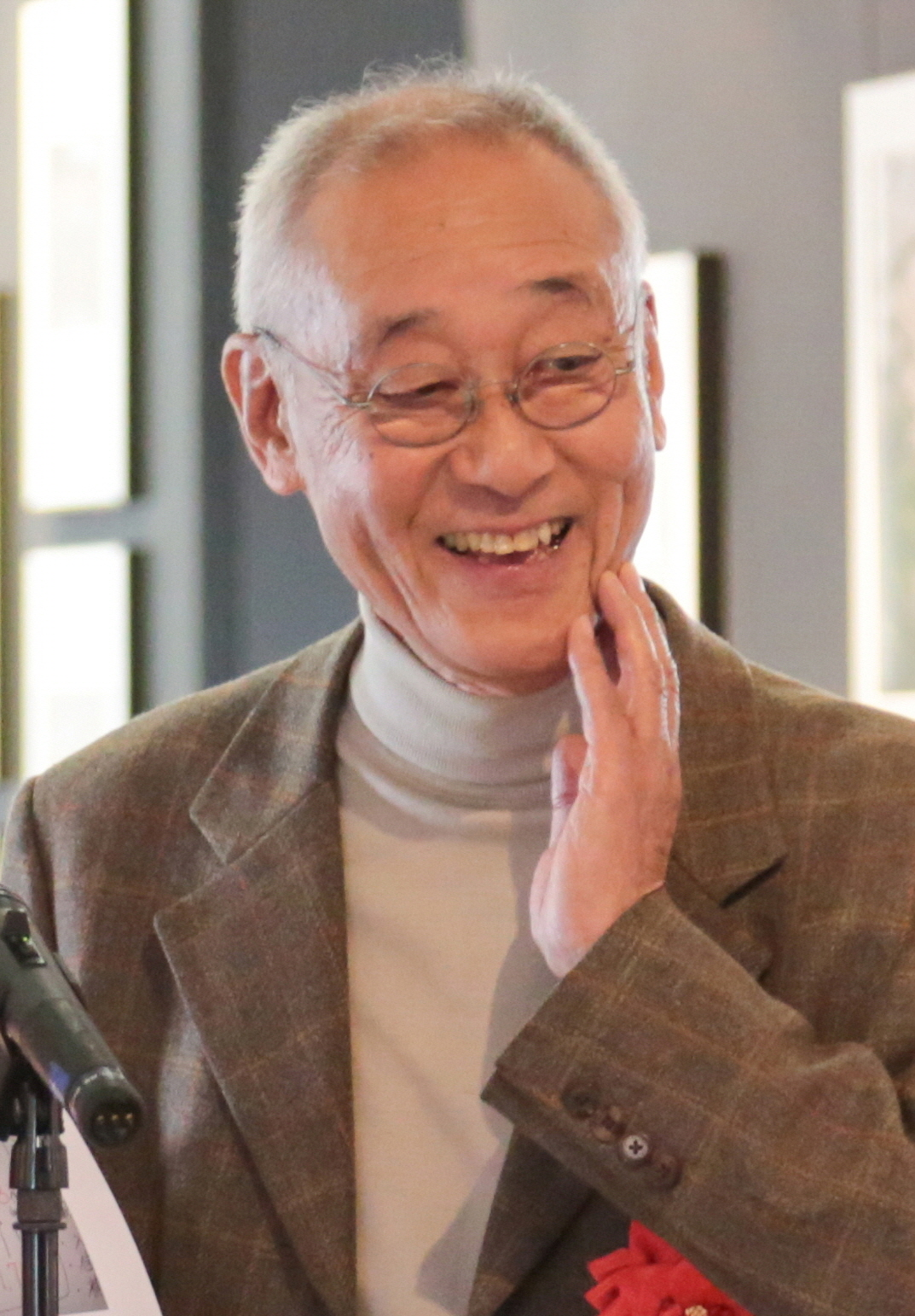 第6回 タムロン鉄道風景コンテスト オープニングセレモニー